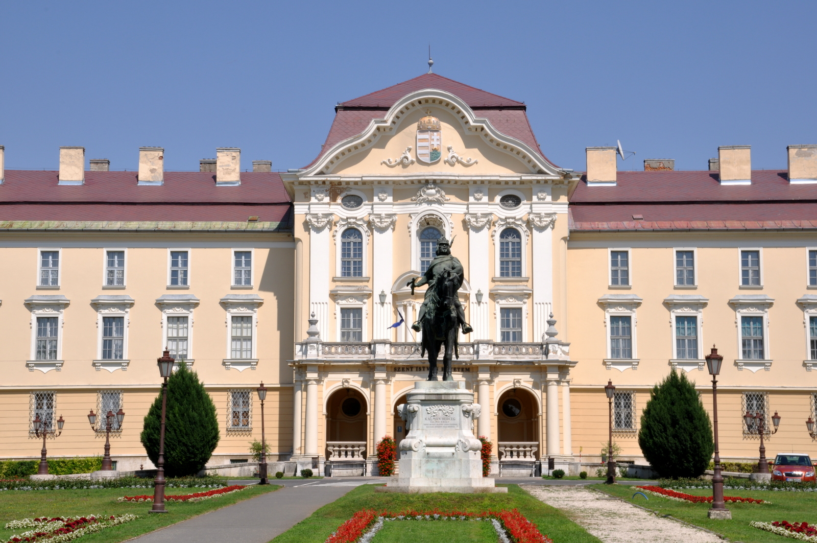 University of Gödöllő This is a photo of a monument in Hungary, Identifier: 15414